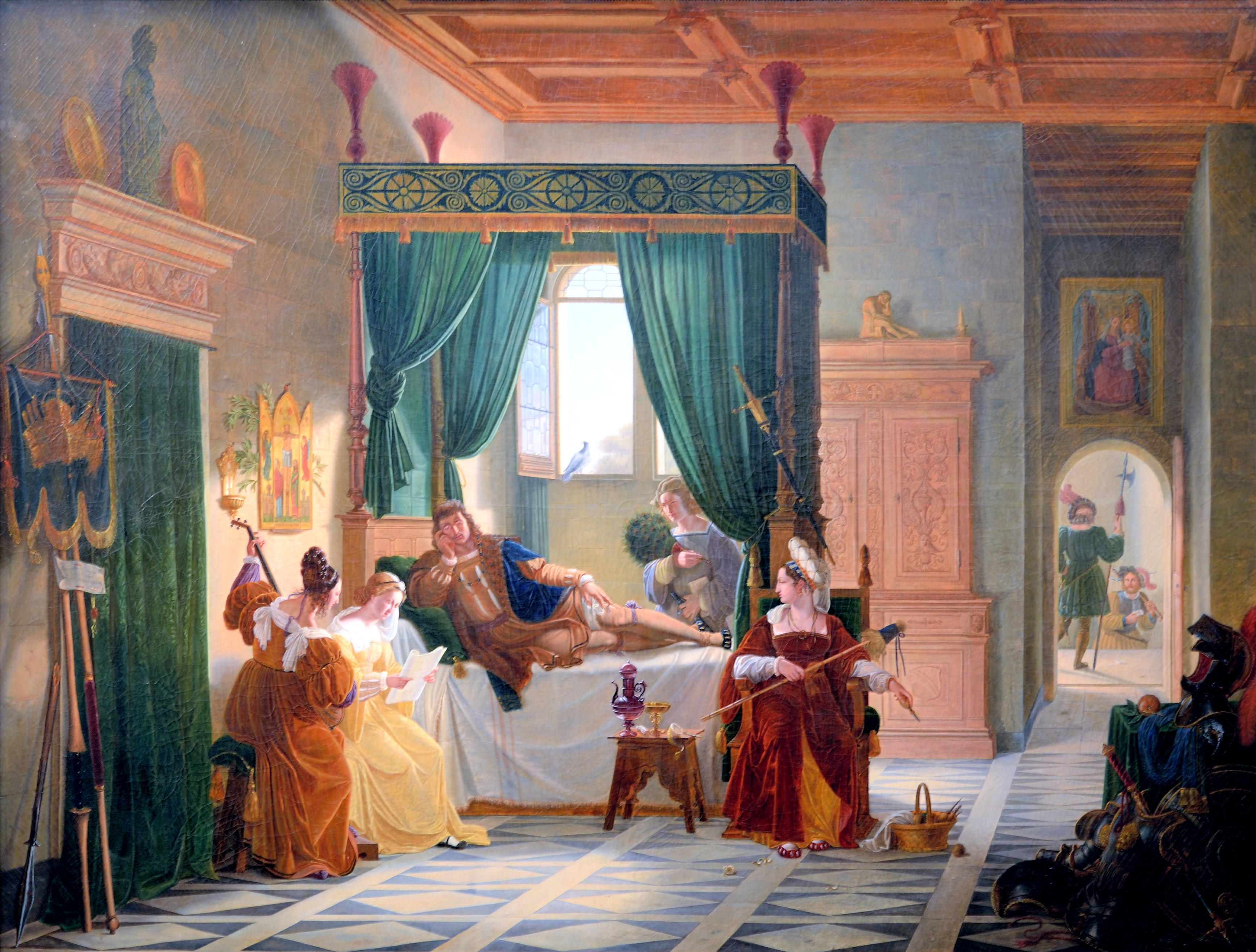 La Convalescence de Bayard, par Pierre REVOIL, œuvre exposée au Musée des beaux arts de Lyon en 2014.